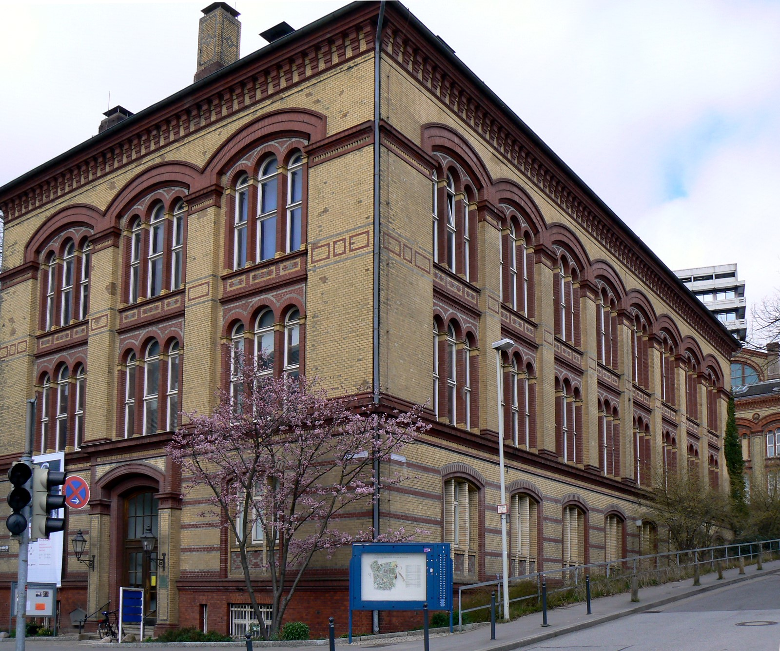 Medizin- und Pharmaziehistorische Sammlung der Christian-Albrechts-Universität Kiel (Frontansicht). Das Gebäude wurde 1881-1884 als Universitäts-Bibliothek von den Architekten Martin Gropius und Heino Schmieden erbaut.